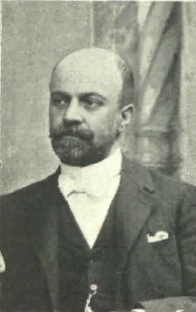 José Monegal y Nogués, presidente de la Cámara de Comercio